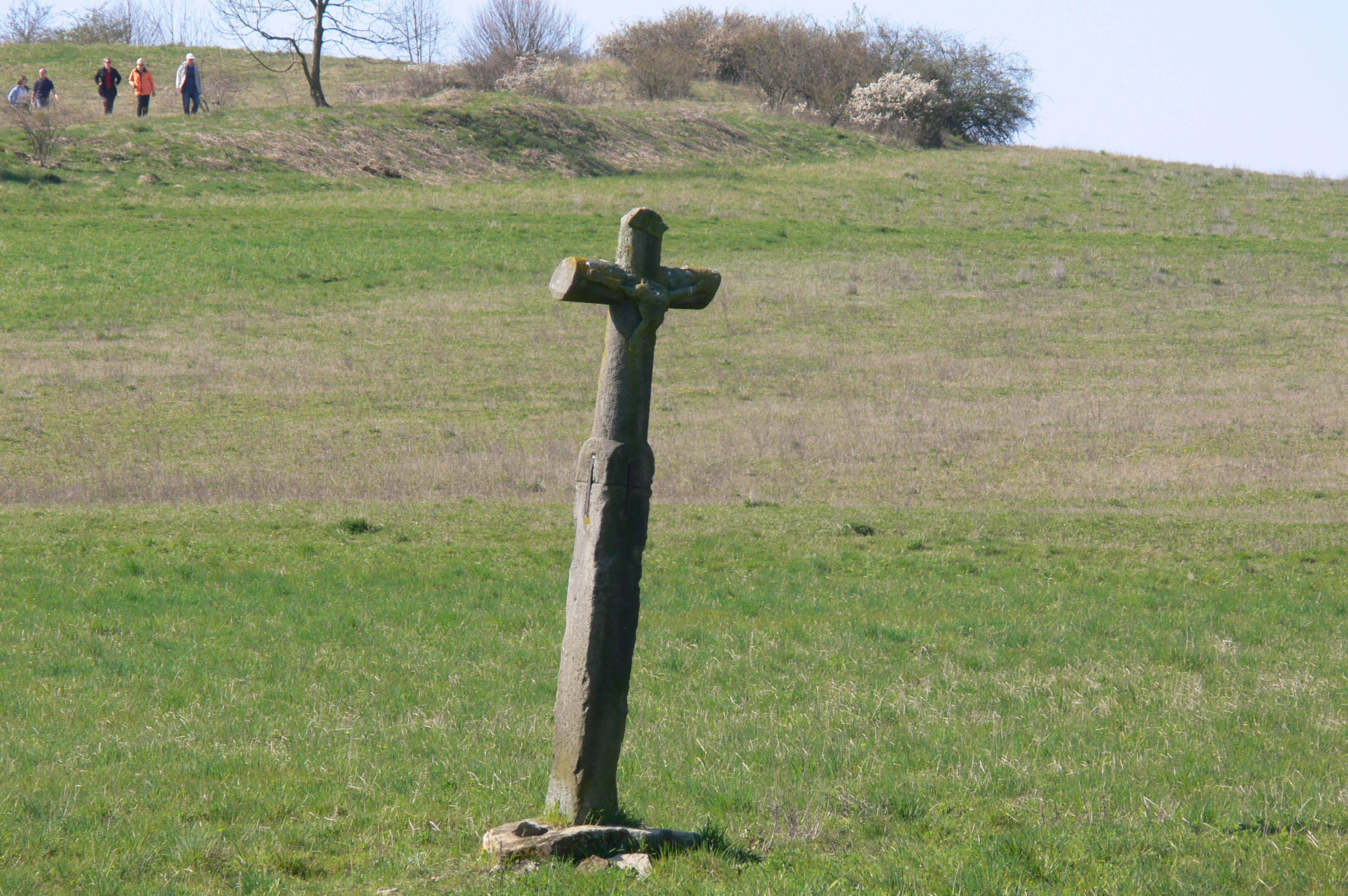 NSG Sodenberg-Gans - das Steinkreuz im Bereich "Gans"